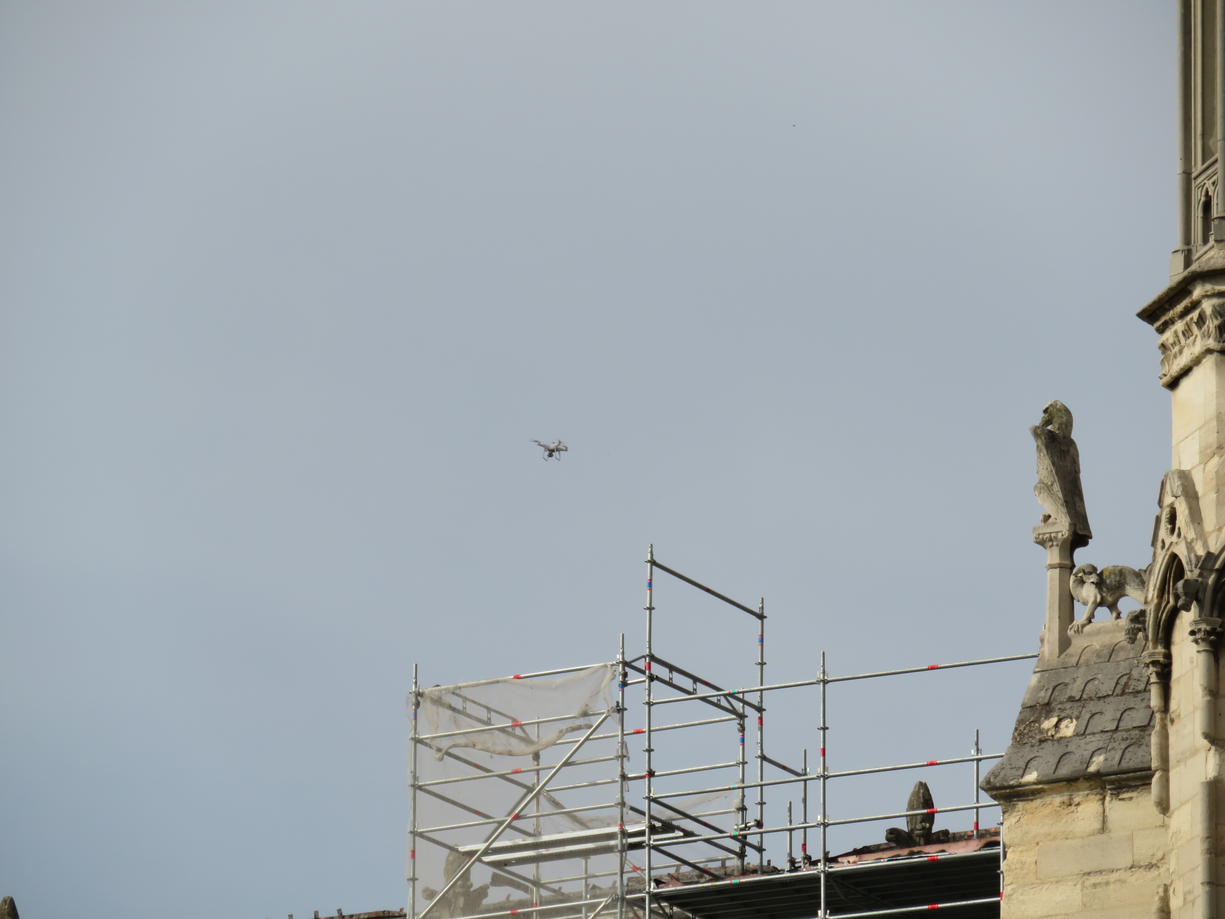 Photos du dimanche 21 avril (fin d’après-midi), pour suivre les travaux sur Notre-Dame après l’incendie (consolidation de diverses parties).